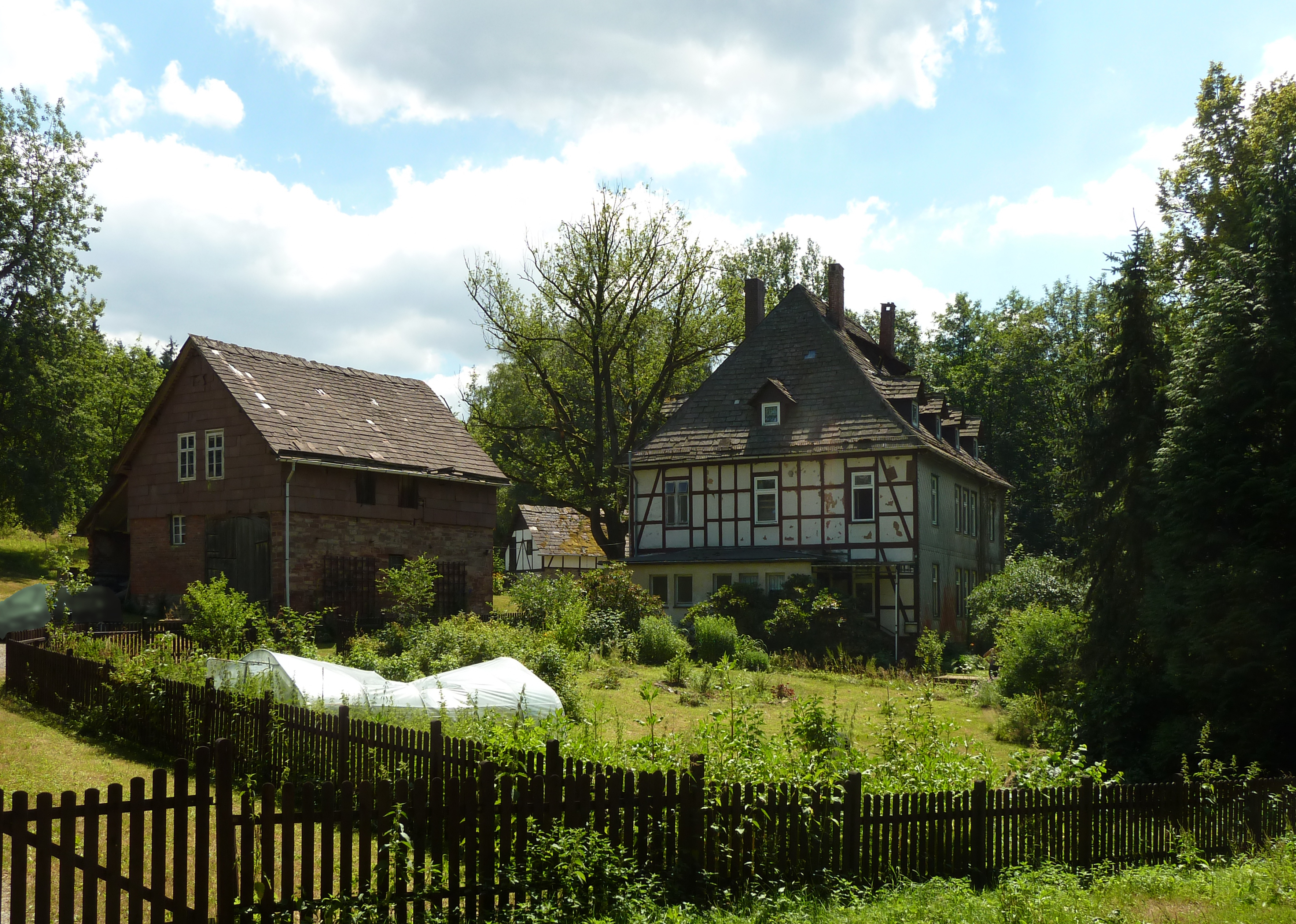 Ehemaliges Gasthaus "Waldmühle" im oberen Hasselbachtal bei Schießhaus im Solling, Landkreis Holzminden, Niedersachsen